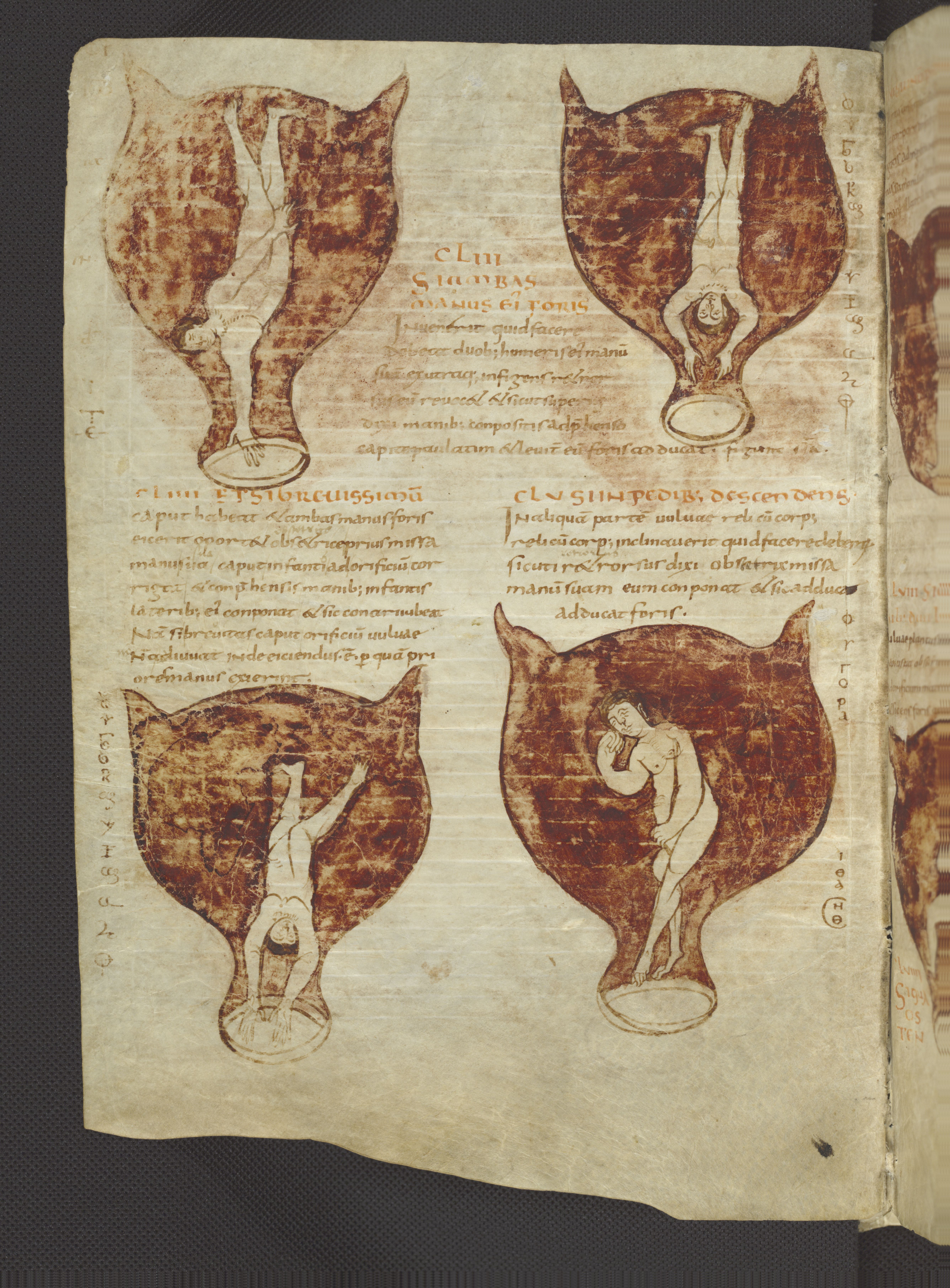 Mustio, Gynaecia (und andere medizinische Abhandlungen). Brussels Koninklijke Bibliotheek van België - Bibliothèque royale de Belgique ms. 3701-15